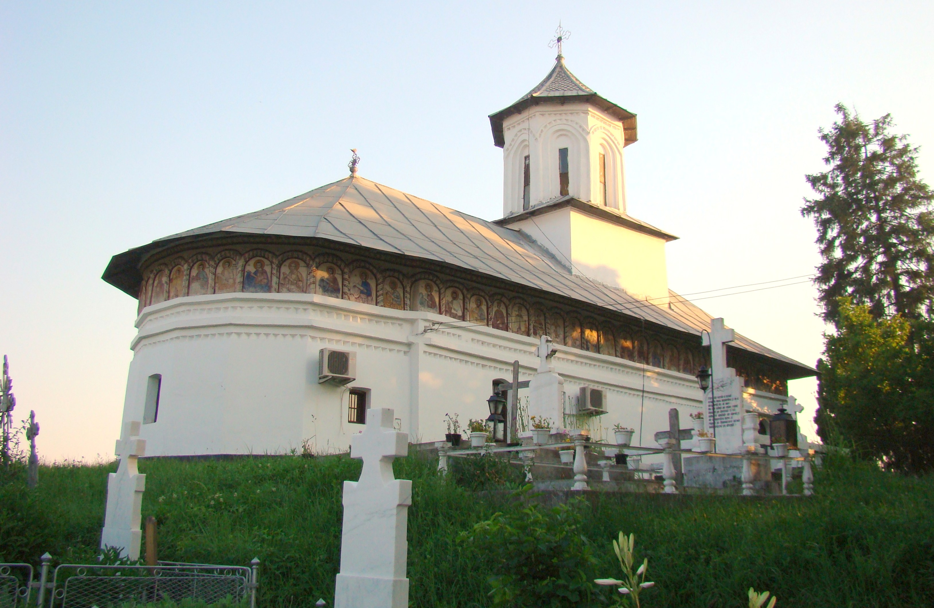 Biserica monument „Sf. Ioan Botezătorul” (1834-1837) din Măgura, județul Vâlcea